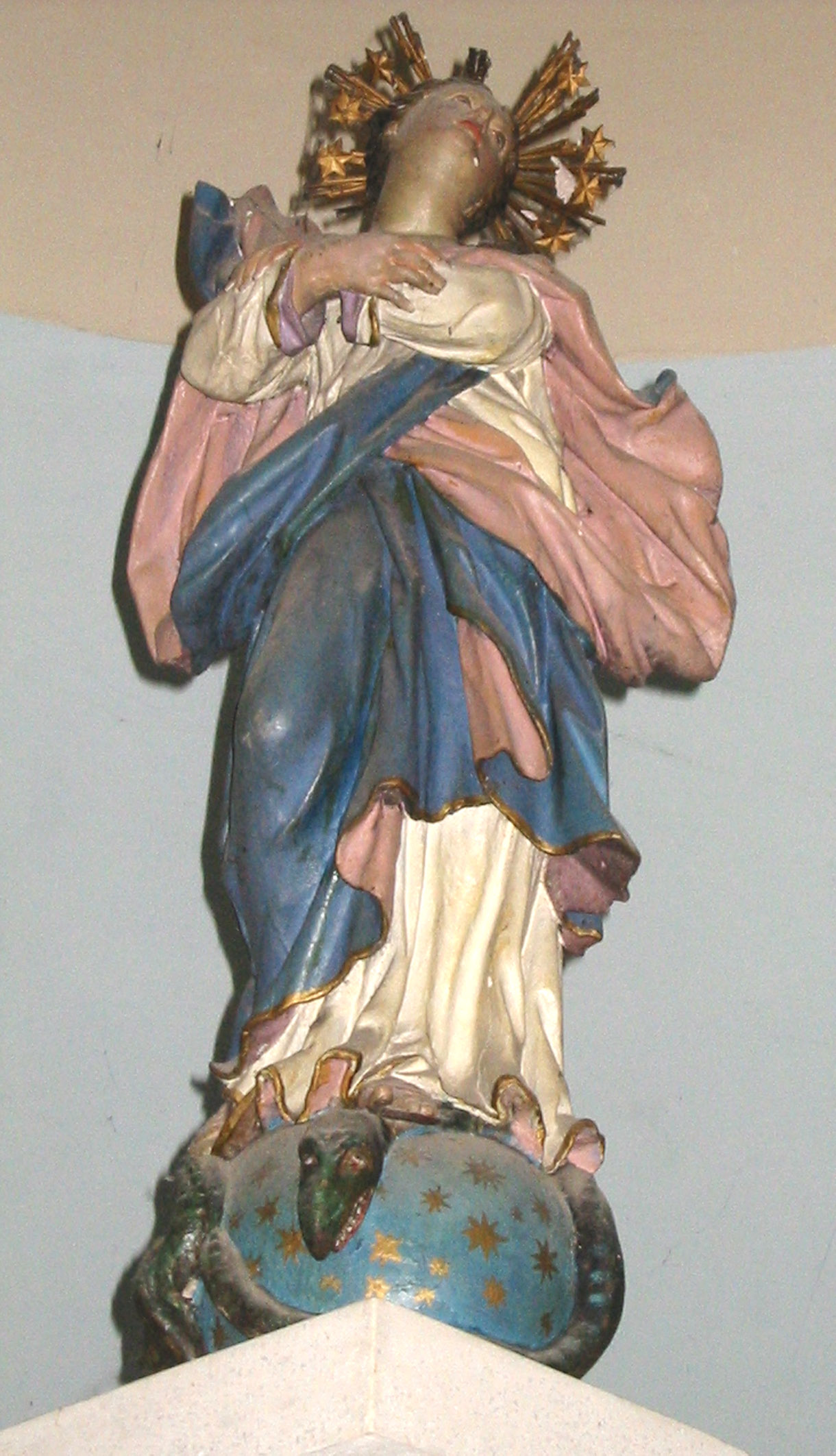 Tirolska rezbarija - kip Bezgrješnog Začeća Marijina u crkvi Gospe Snježne na Tekijama u Petrovaradinu